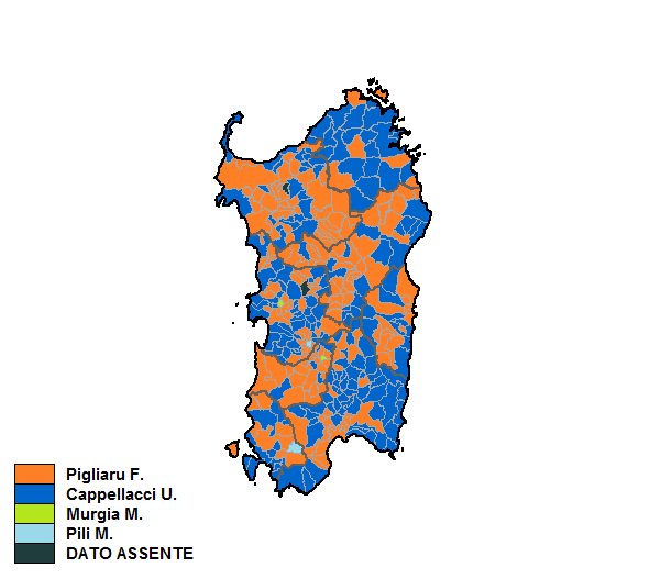 Candidati vincitori nei singoli comuni nelle elezioni regionali in Sardegna del 2014.